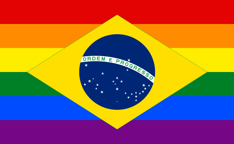 This vector image includes elements that have been taken or adapted from this file: Gay flag.svg. This vector image includes elements that have been taken or adapted from this file: Flag of Brazil.svg.